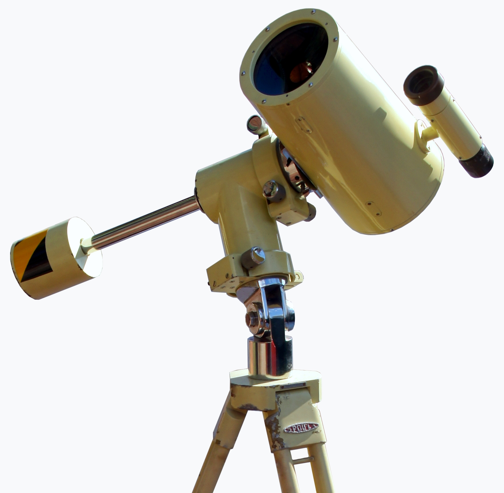 Телескоп «БАМ-5А»[1][2] – это Бюраканский азимутальный телескоп системы Д. Д. Максутова. Преимущество телескопов этого типа состоит в больших размерах полезного неискажённого поля зрения. Основные характеристики телескопа: Эквивалентное фокусное расстояние f′ = 1176,6 мм Диаметр светового отверстия D = 100 мм Разрешающая способность 1,4" Относительное отверстие А = 1:12 (1:11,77) Поле зрения 15′ при увеличении 84× Увеличение системы при окуляре с фокусным расстоянием f = 10 мм составляет 118× раз, а при окуляре с фокусным расстоянием f = 14 мм – 84× раза. Параллактическая (экваториальная) монтировка немецкого типа Параллактическая головка монтировки допускает установку телескопа на широтах между 0º и 90º. Искатель диаметром 30 мм, фокусным расстоянием объектива 120 мм, увеличением 6× и полем 3º Общий вес телескопа – 21,5 кг.